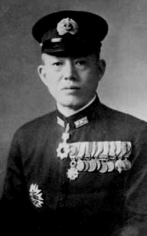 Japanese Admiral Daigo Tadashige